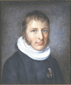 Norwegian: Hieronymus Heyerdahl (1773–1847) med to ordener; Nordstjernen og Dannebrog. Kopi etter en miniatyr.title QS:P1476,no:"Hieronymus Heyerdahl (1773–1847) med to ordener; Nordstjernen og Dannebrog. Kopi etter en miniatyr." label QS:Lno,"Hieronymus Heyerdahl (1773–1847) med to ordener; Nordstjernen og Dannebrog. Kopi etter en miniatyr."